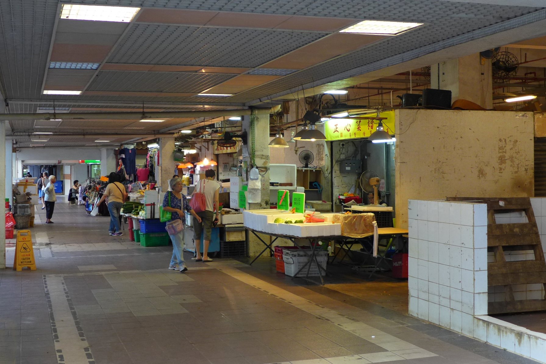 Kai Yip Market